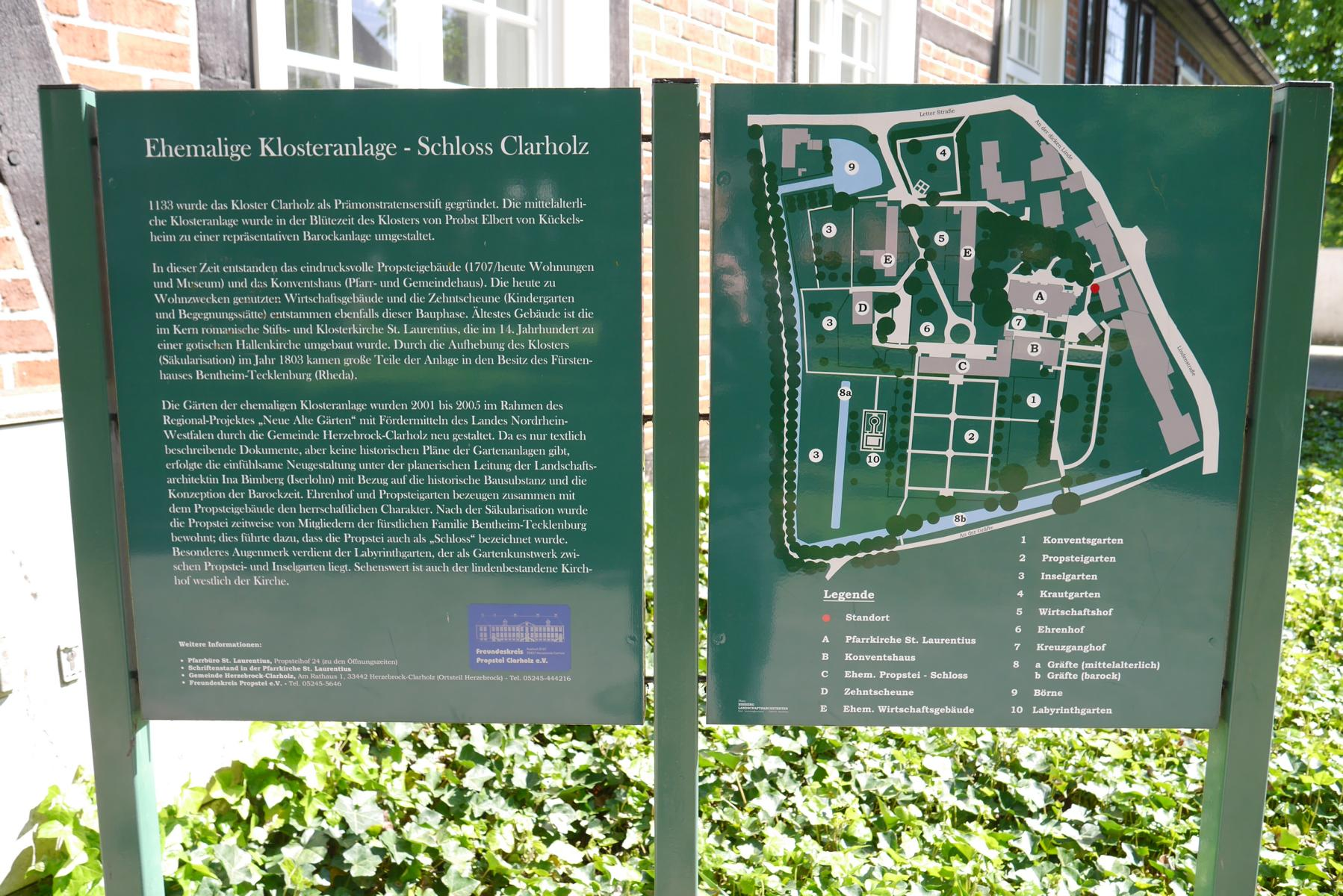 Lageplan der ehemaligen Klosteranlage - Schloss Clarholz